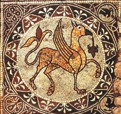 Mosaico del Grifone, scoperto nella cripta della cattedrale di Bitonto.